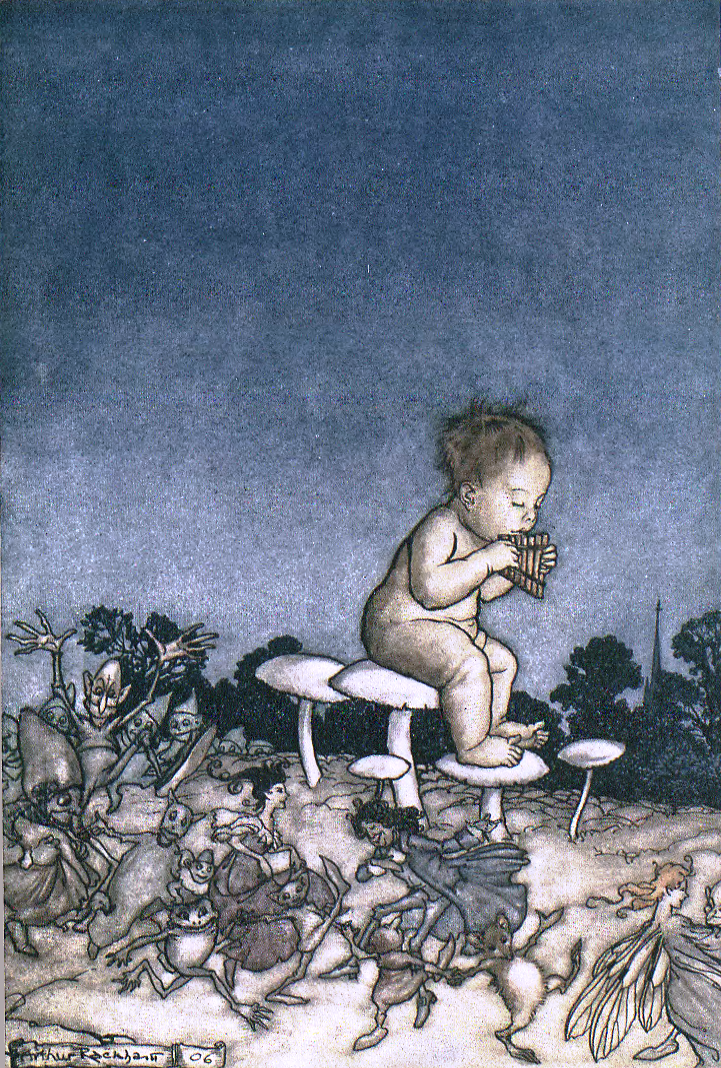 grafika z książki PL "Przygody Piotrusia Pana" publikacja Wydawnictwo J. Mortkowicza Warszawa 1914